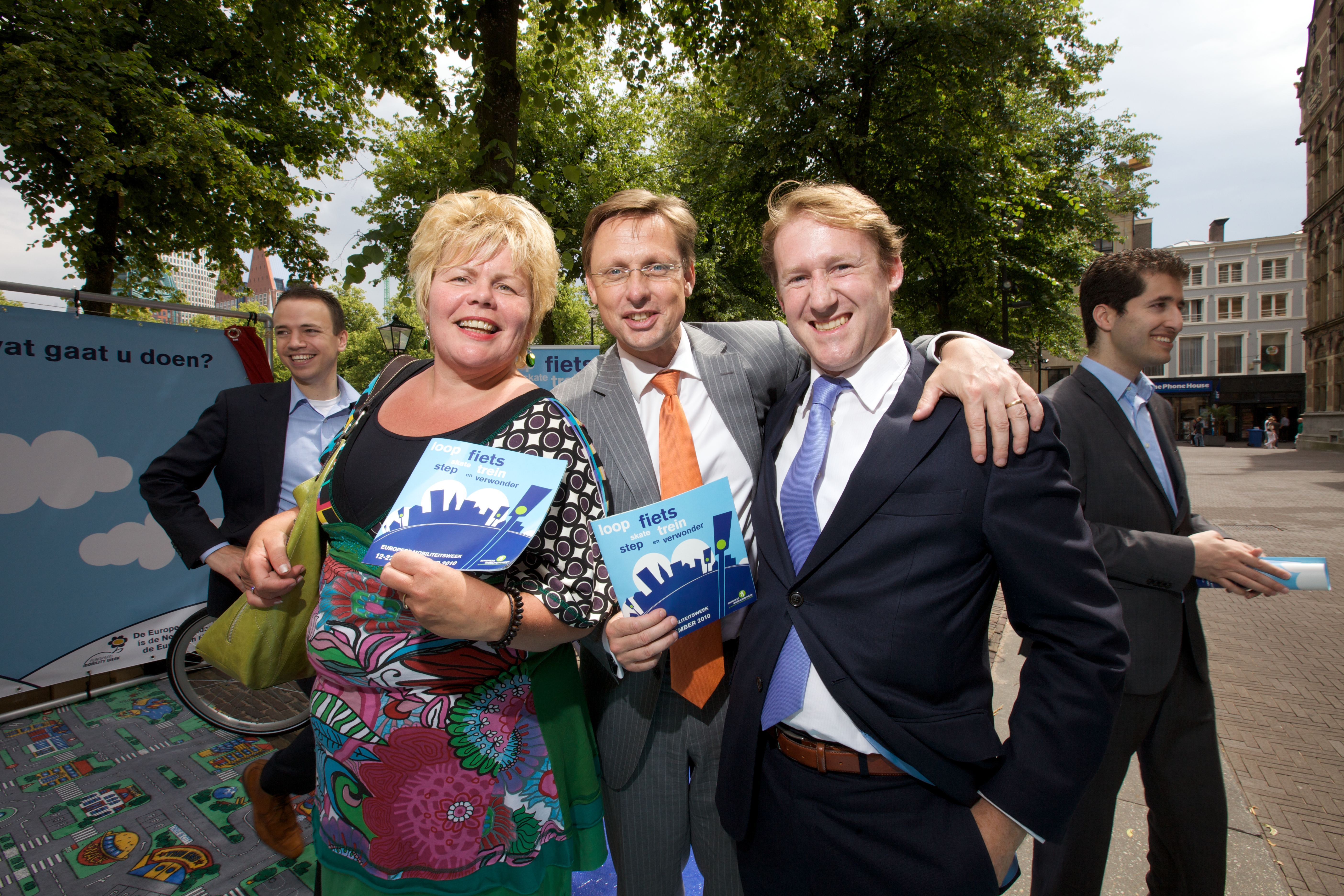 Lancering Europese Mobiliteitsweek 2010